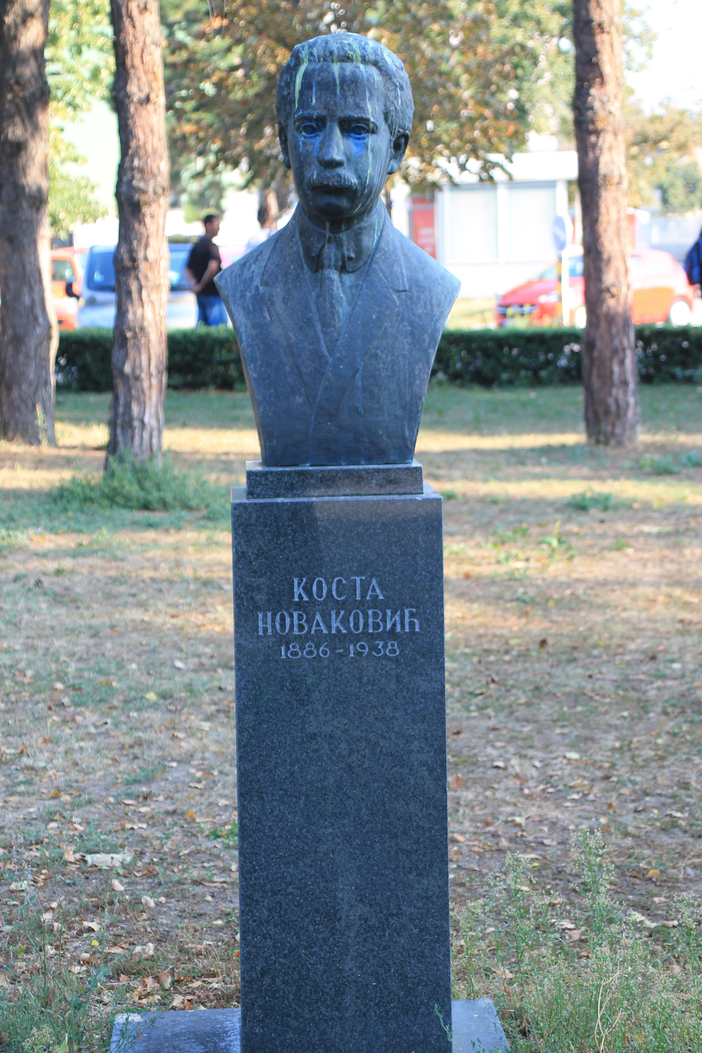 Spomen bista Koste Novakovića